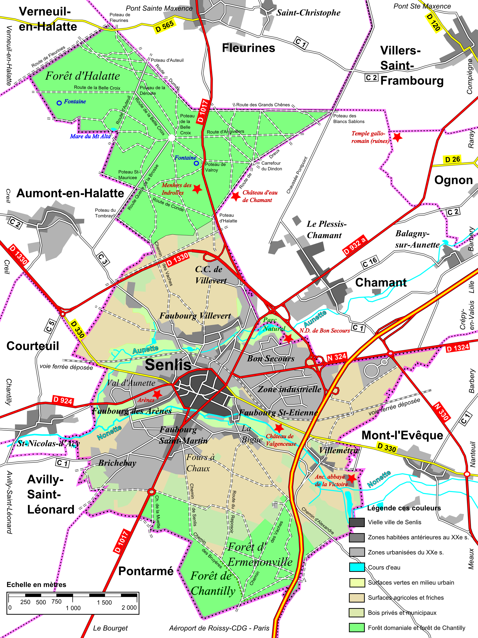 Carte topographique simplifiée de la commune de Senlis (Oise).